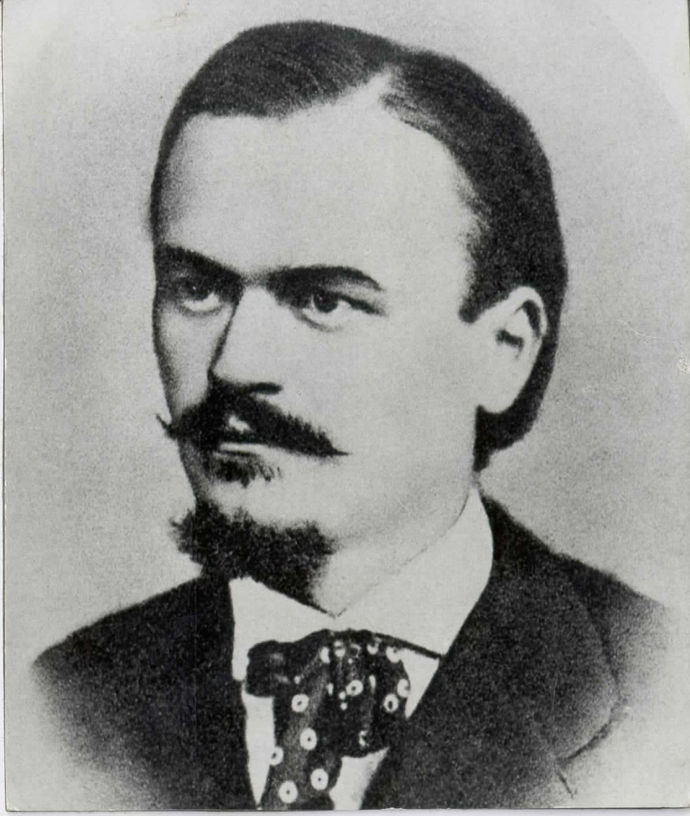 Josip Jurčič